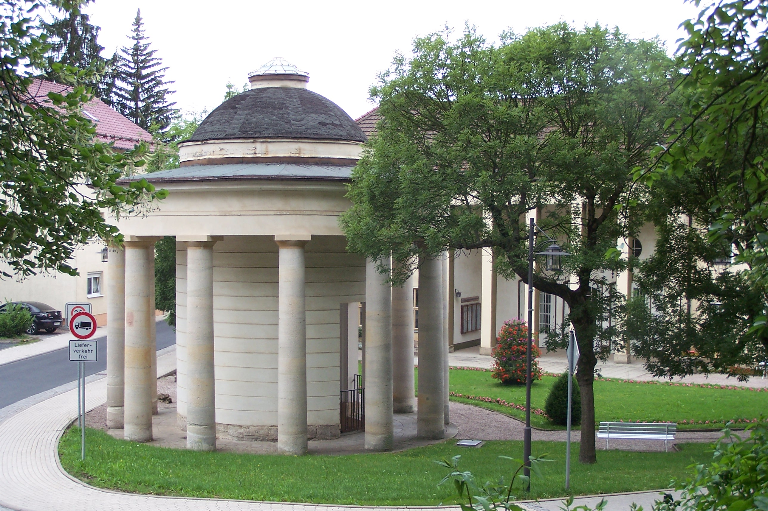 Bad Liebenstein